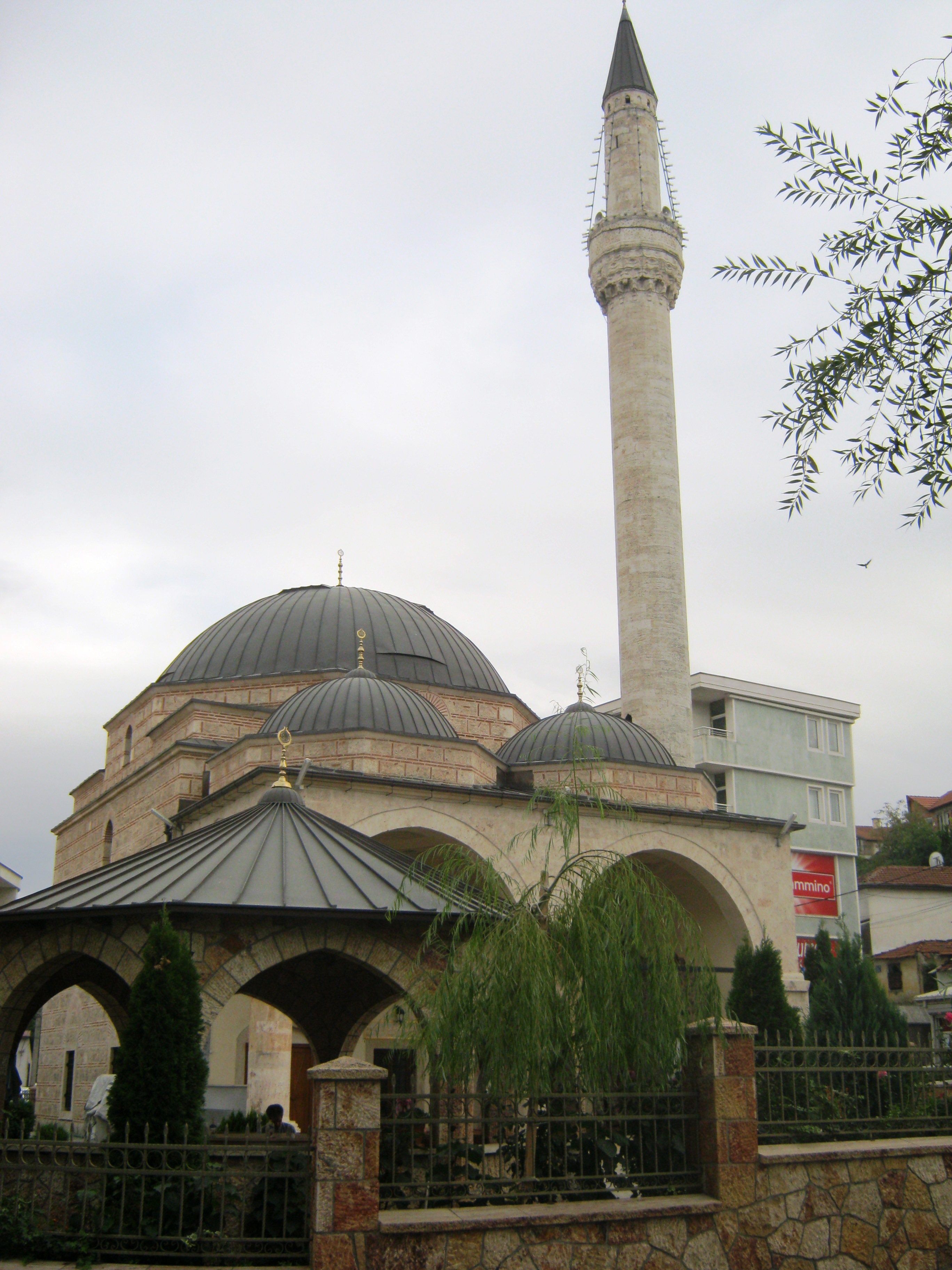 Џамија Дуќанџик